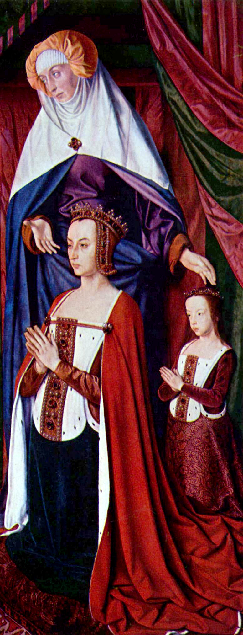 rechter Flügel, Szene: Porträt der Anne de France mit der Schutzheiligen und ihrer Tochter Suzanne